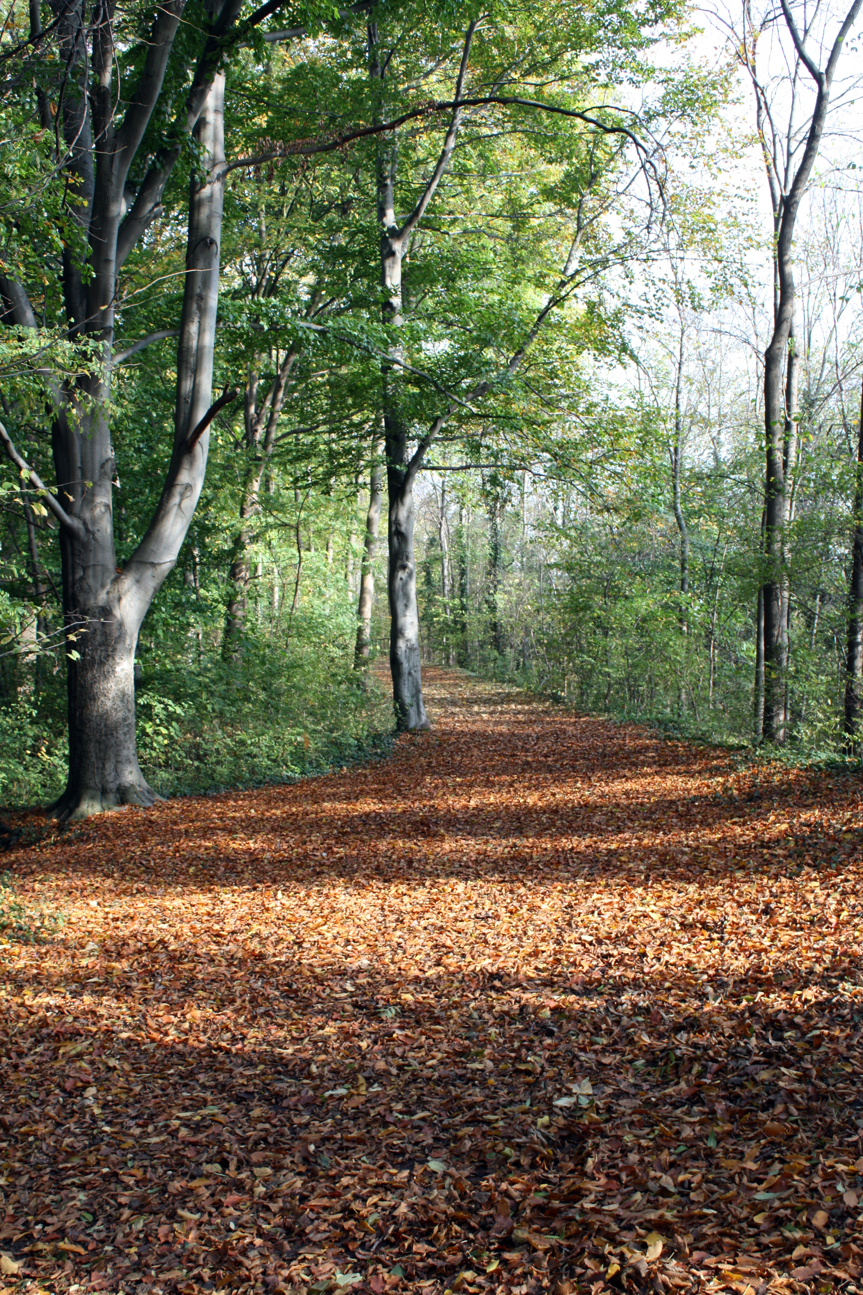 Alt-Hürth, Adolf-Dasbach-Weg